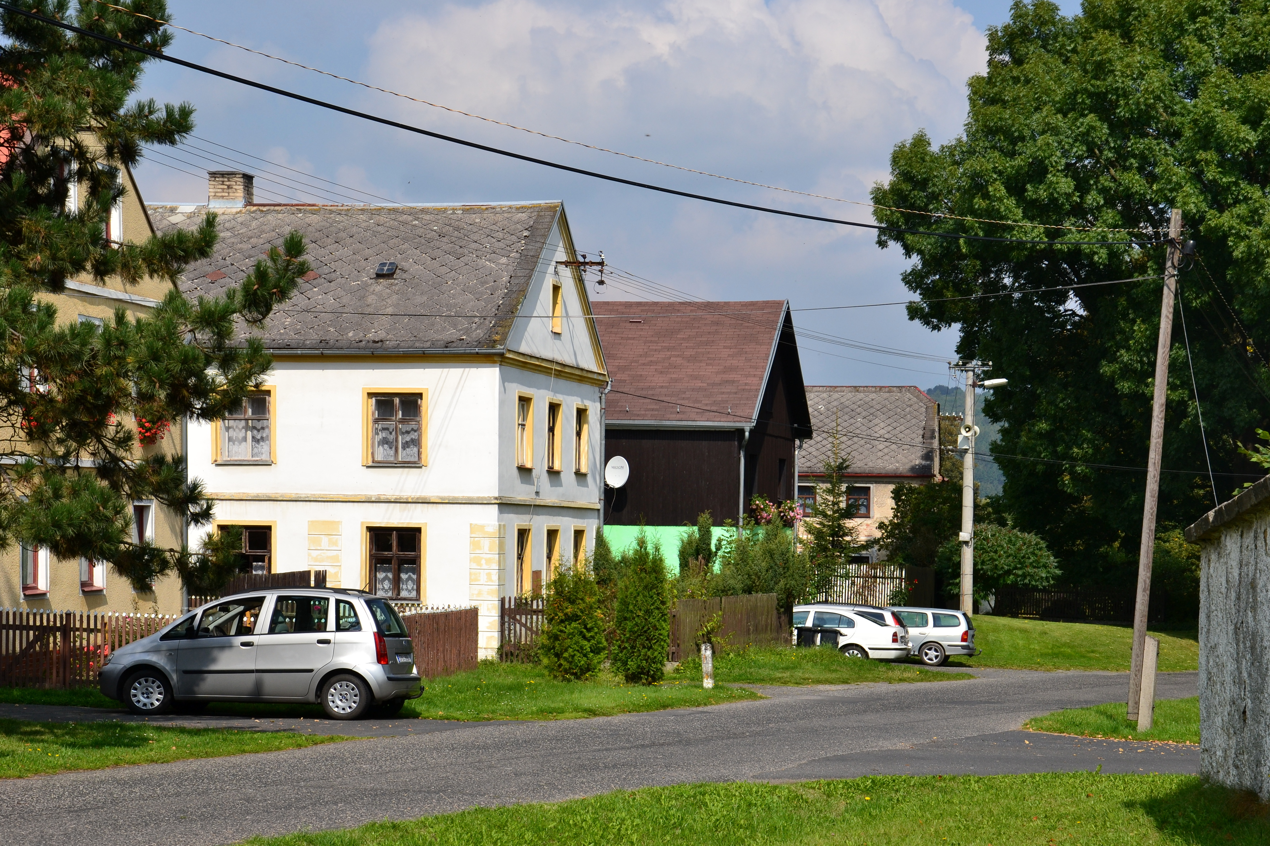 Domy u kostela